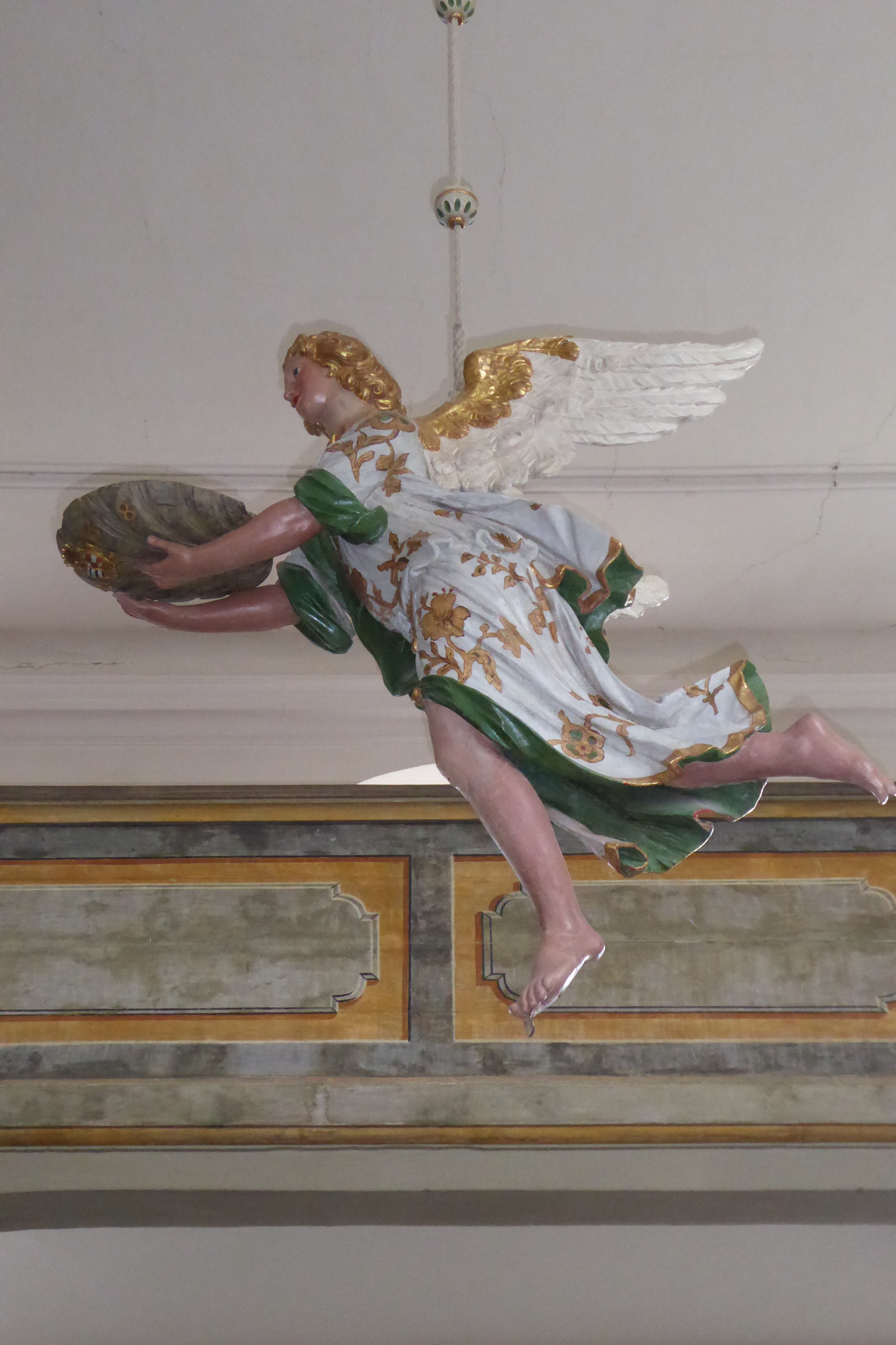 Taufengel in der St. Bartholomäuskirche in Röhrsdorf, Gemeinde Klipphausen